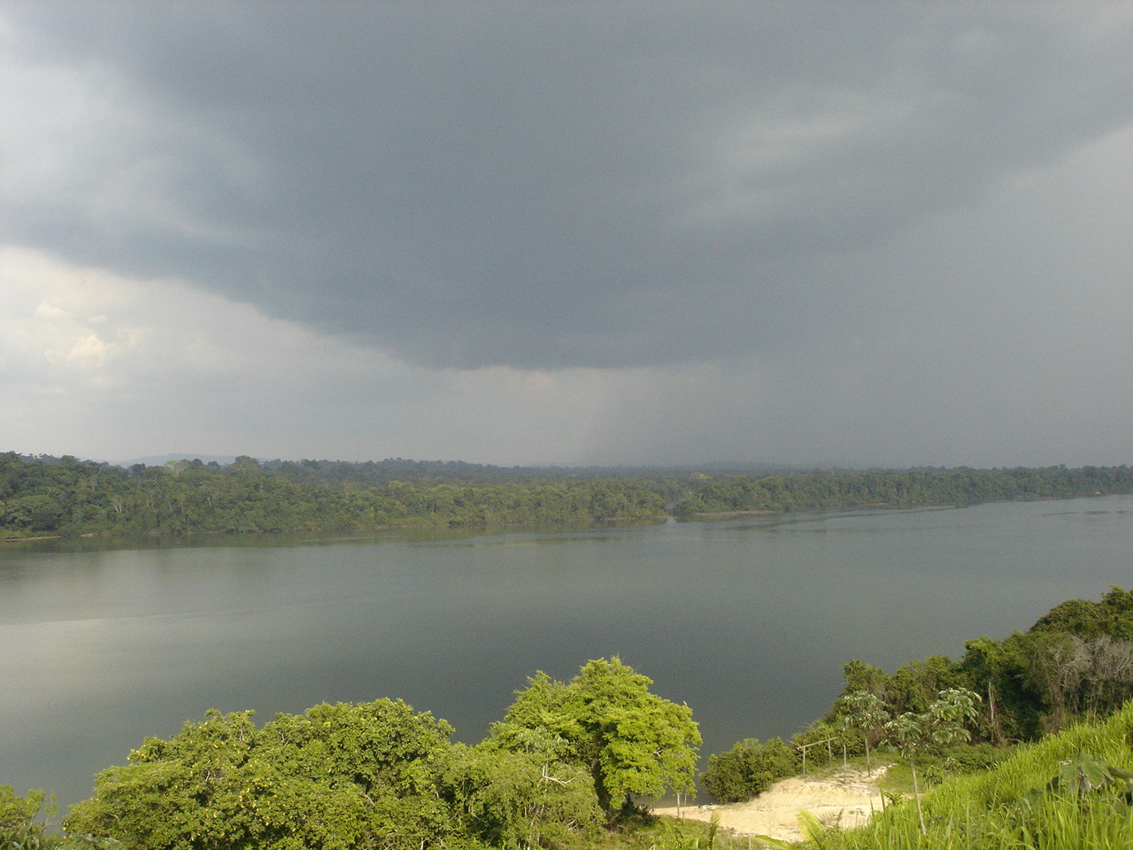 Esperando a chuva no Rio Xingu, dentro do Parque Nacional da Serra do Pardo, Estado do Pará.